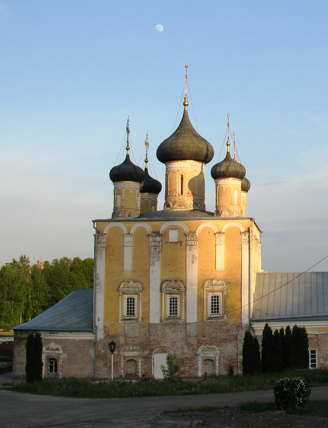 Uspenskaia Church (Voronezh)